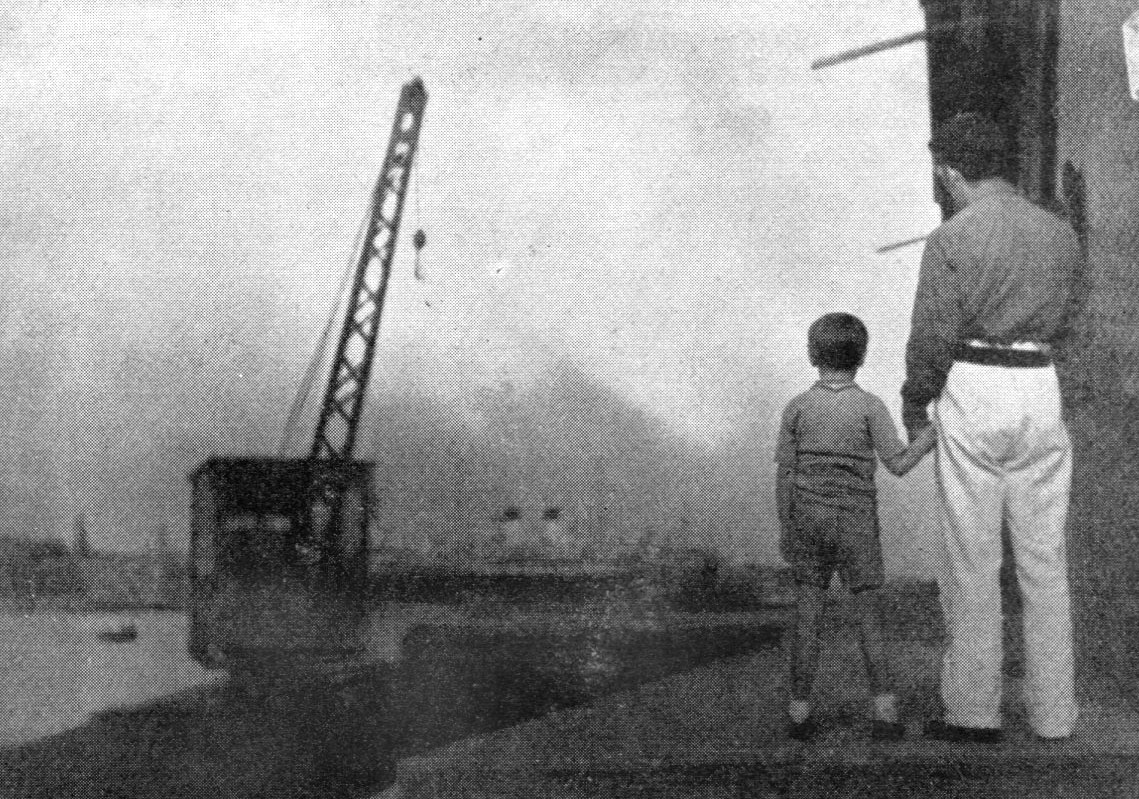 Il canale degli angel (regia di Francesco Pasinetti, 1934) - scena: la draga